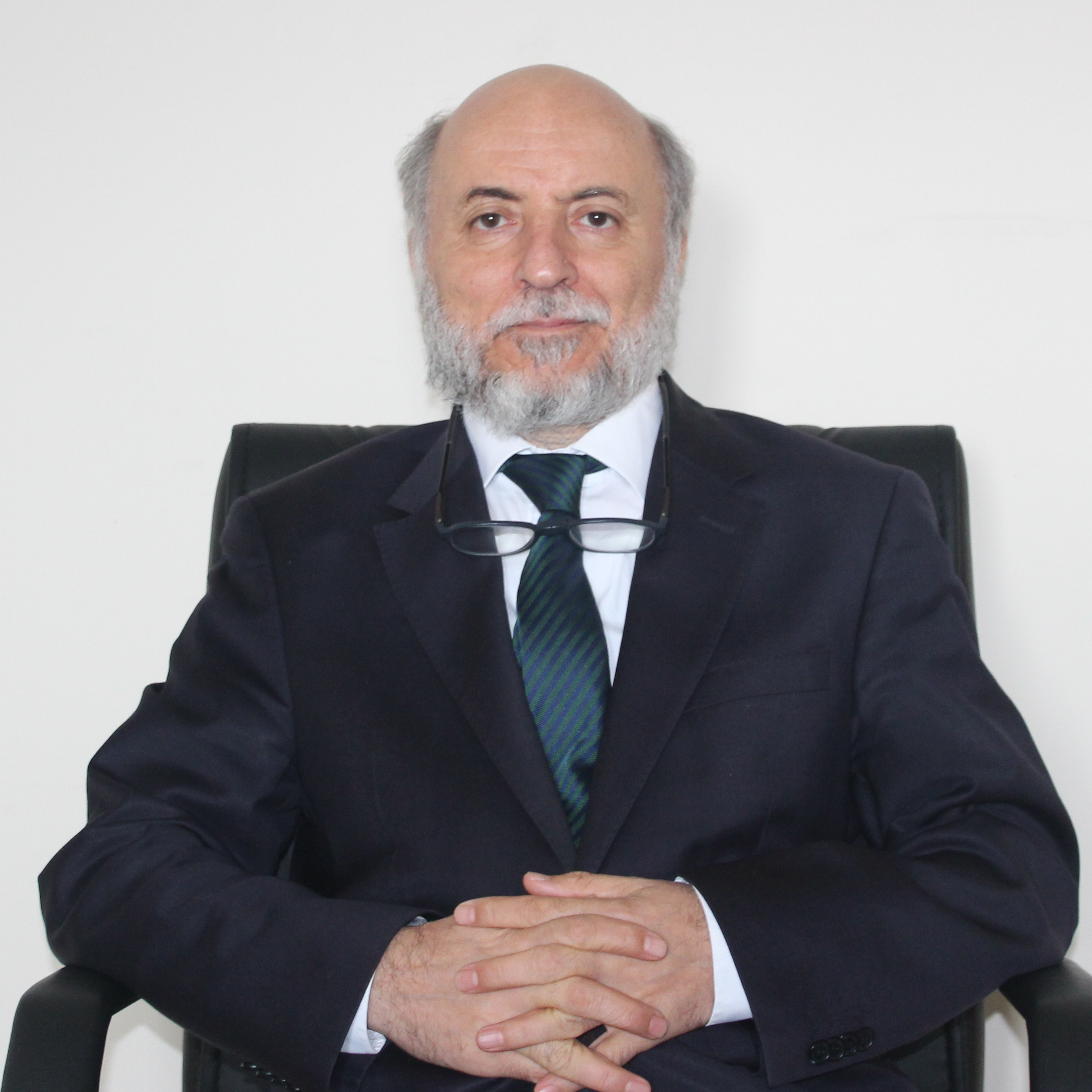 Prof. Dr. Mustafa Öztürk 2020 yılı Nisan ayına ait fotoğraf